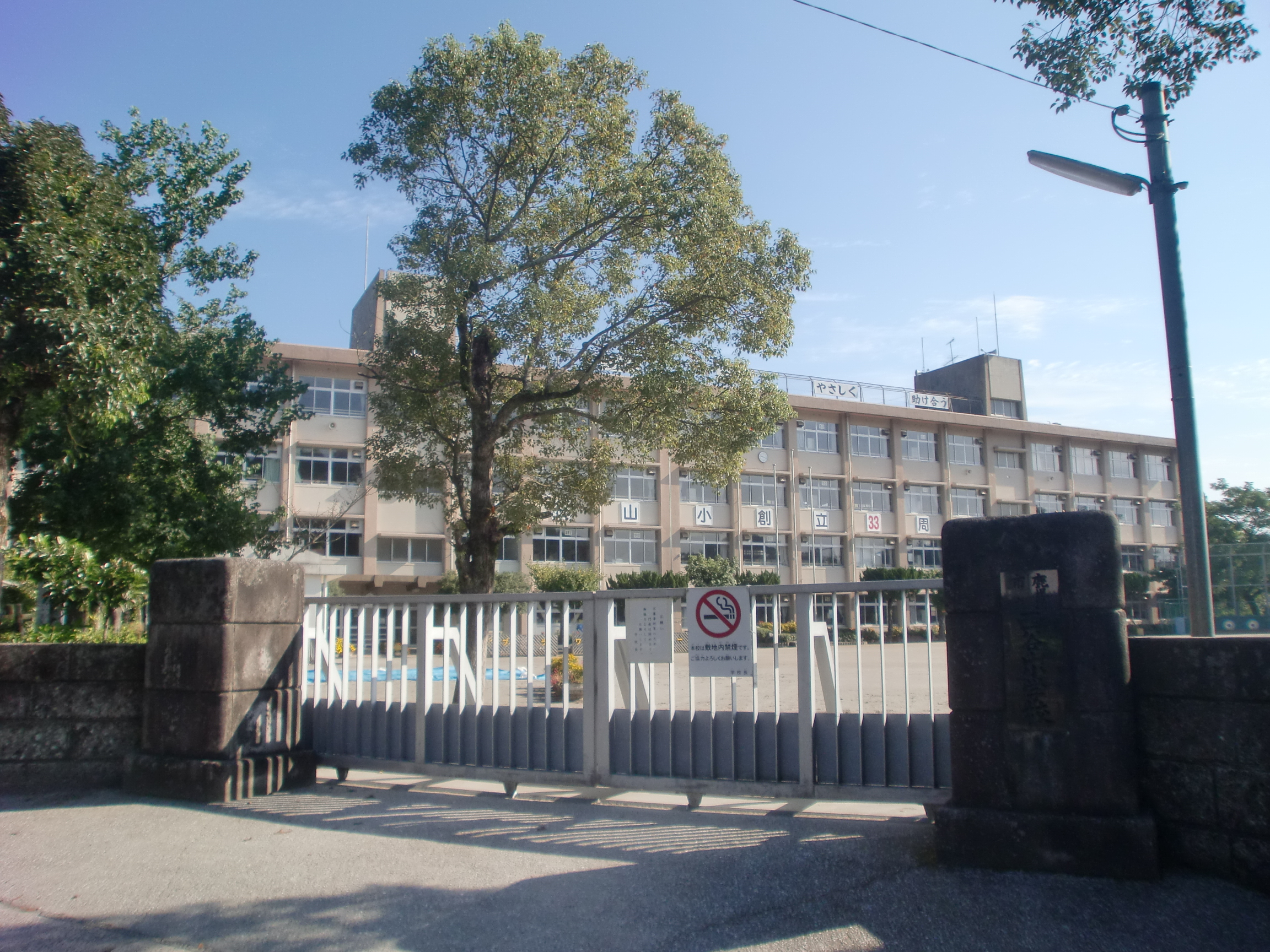 鹿児島市立西谷山小学校の外観。